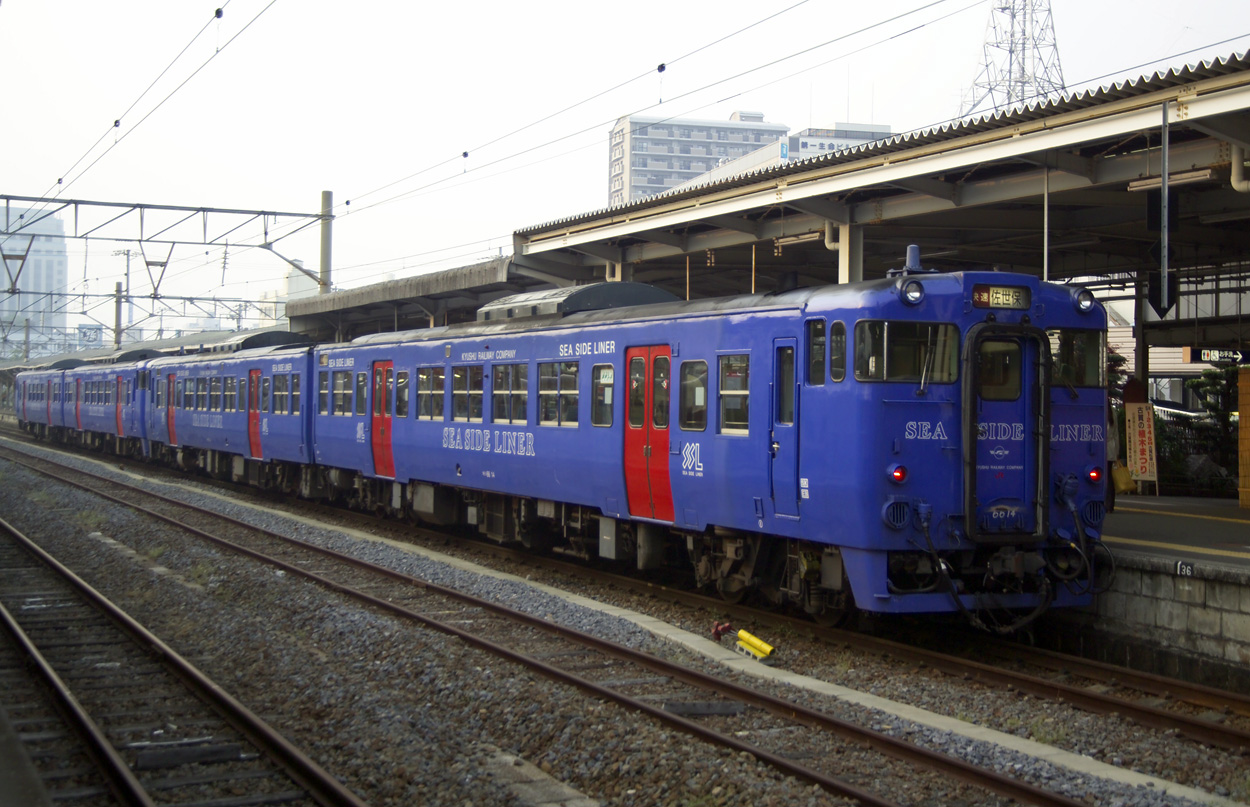 JR Kyushu Seaside Liner at Nagasaki Station, Nagasaki, Japan